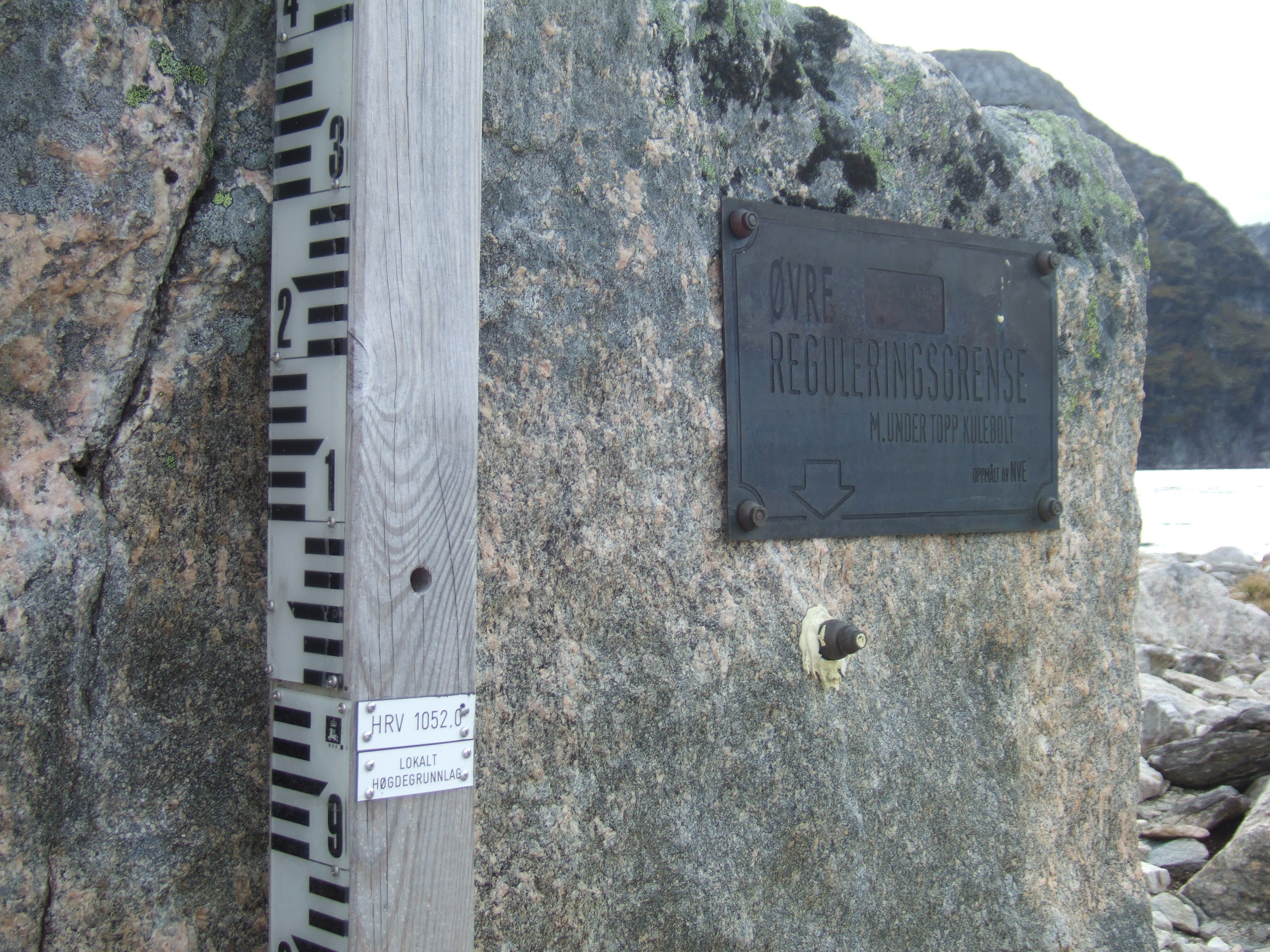 Label showing highest regulated water level in the dam Fetvatnet. The label is put out by Norwegian Water Resources and Energy Directorate.